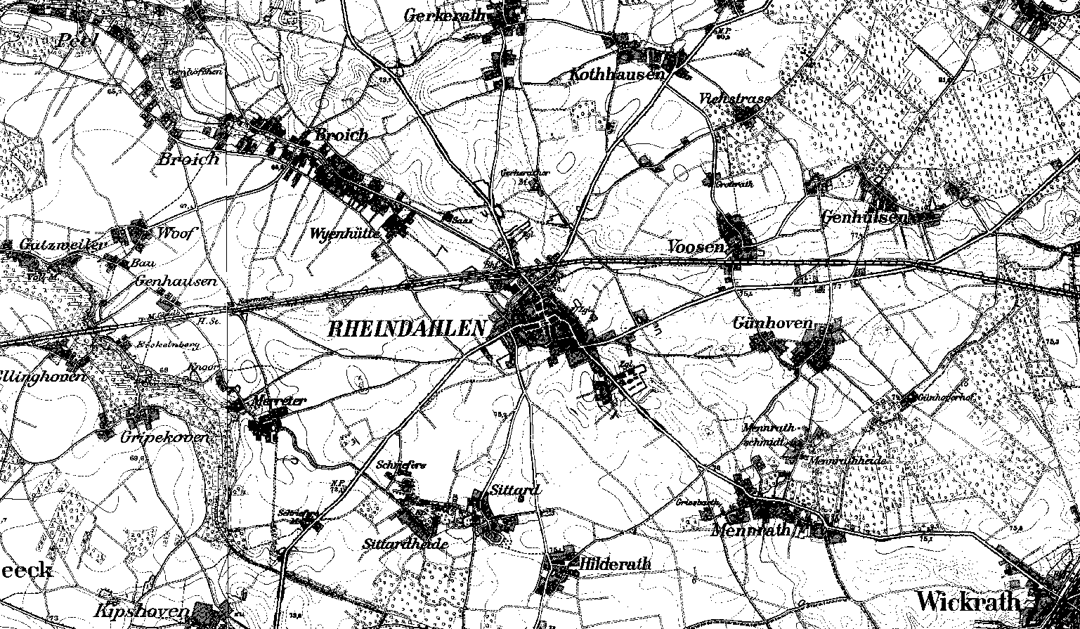 Karte von Rheindahlen nach der Neuaufnahme.